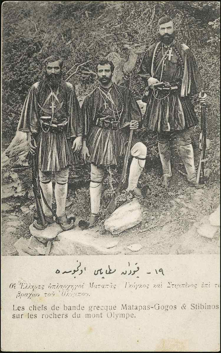 Матапас, Гогос, Стибинос.